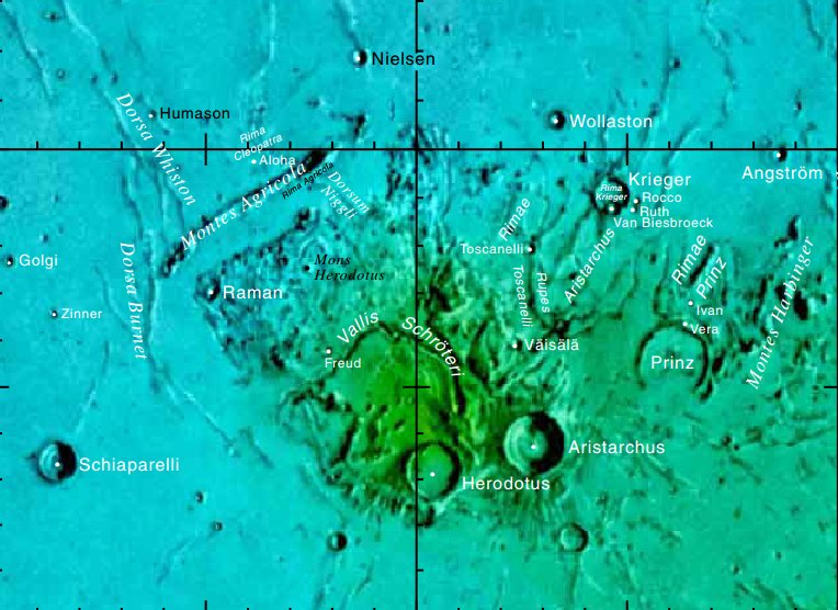 Zona del Vallis Schröteri. (Imagen LRO)